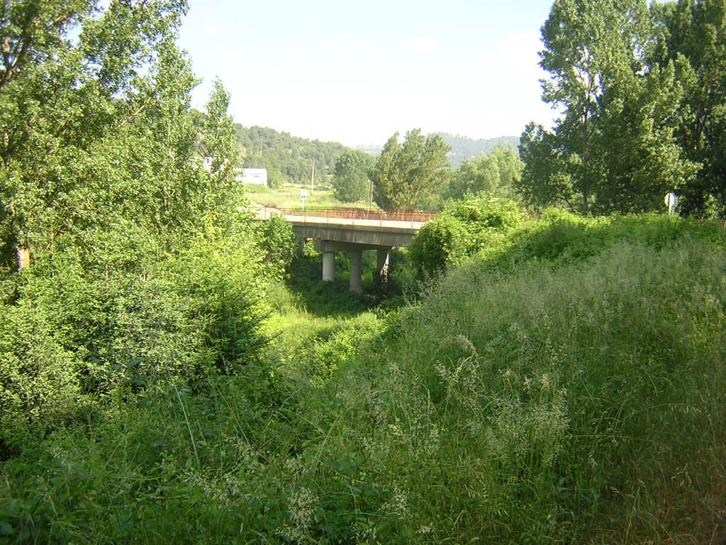 El Pont del Tasar (Monistrol de Calders, Moianès)